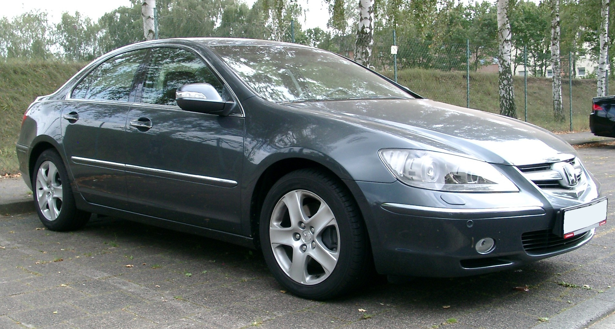 Honda Legend